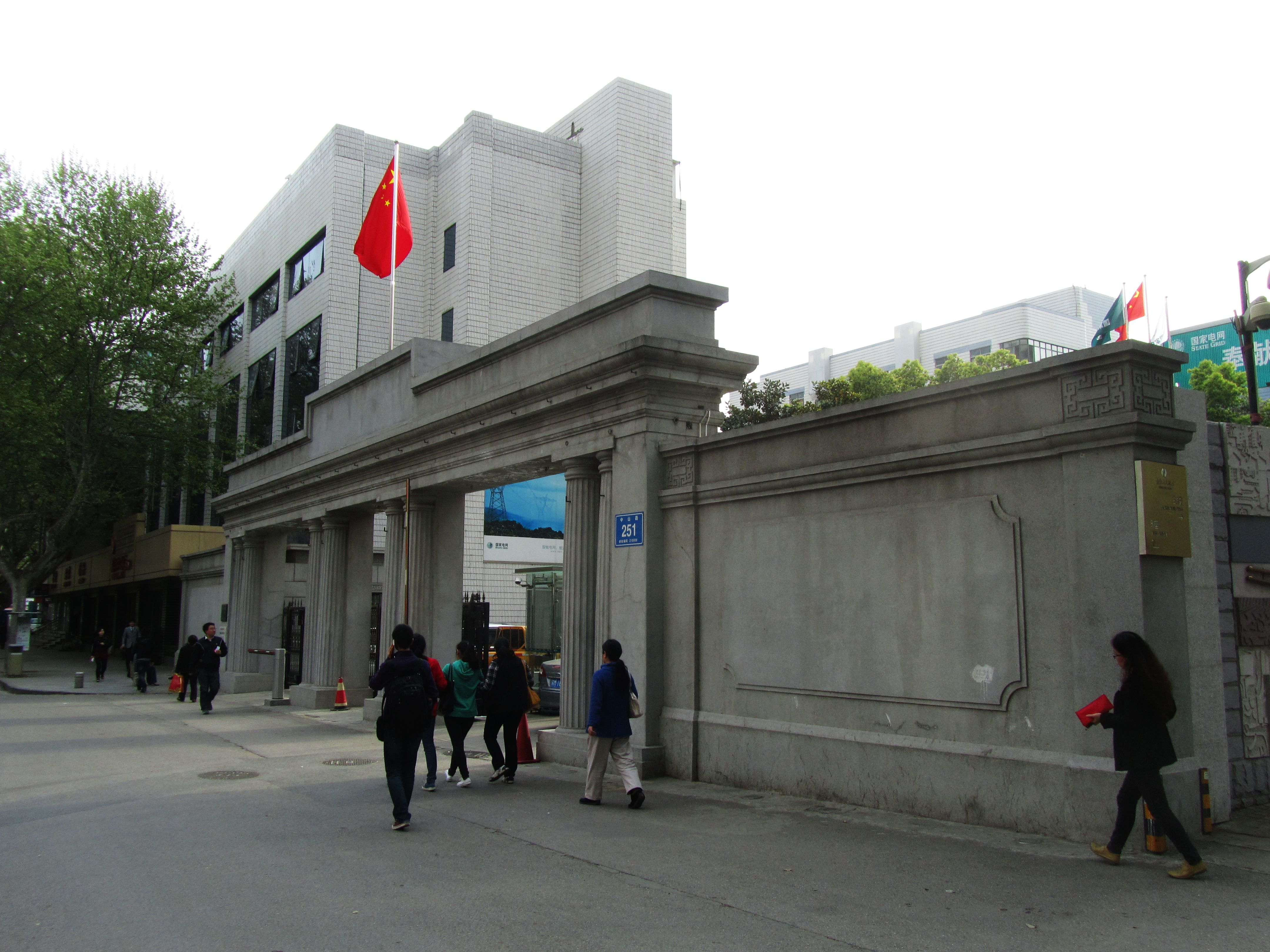 南京原国民政府司法部大门旧址。